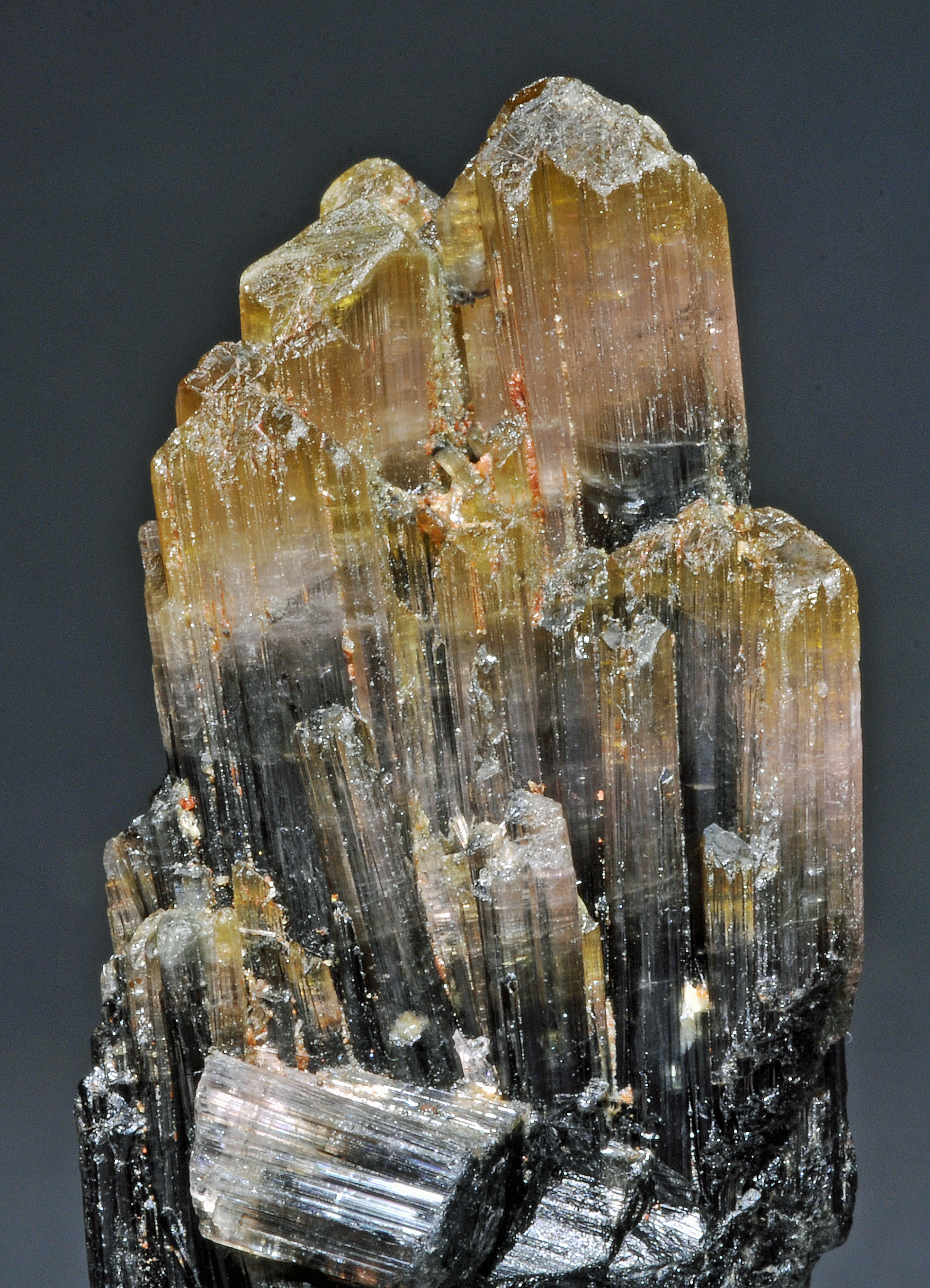 cristaux de tourmaline var. elbaïte